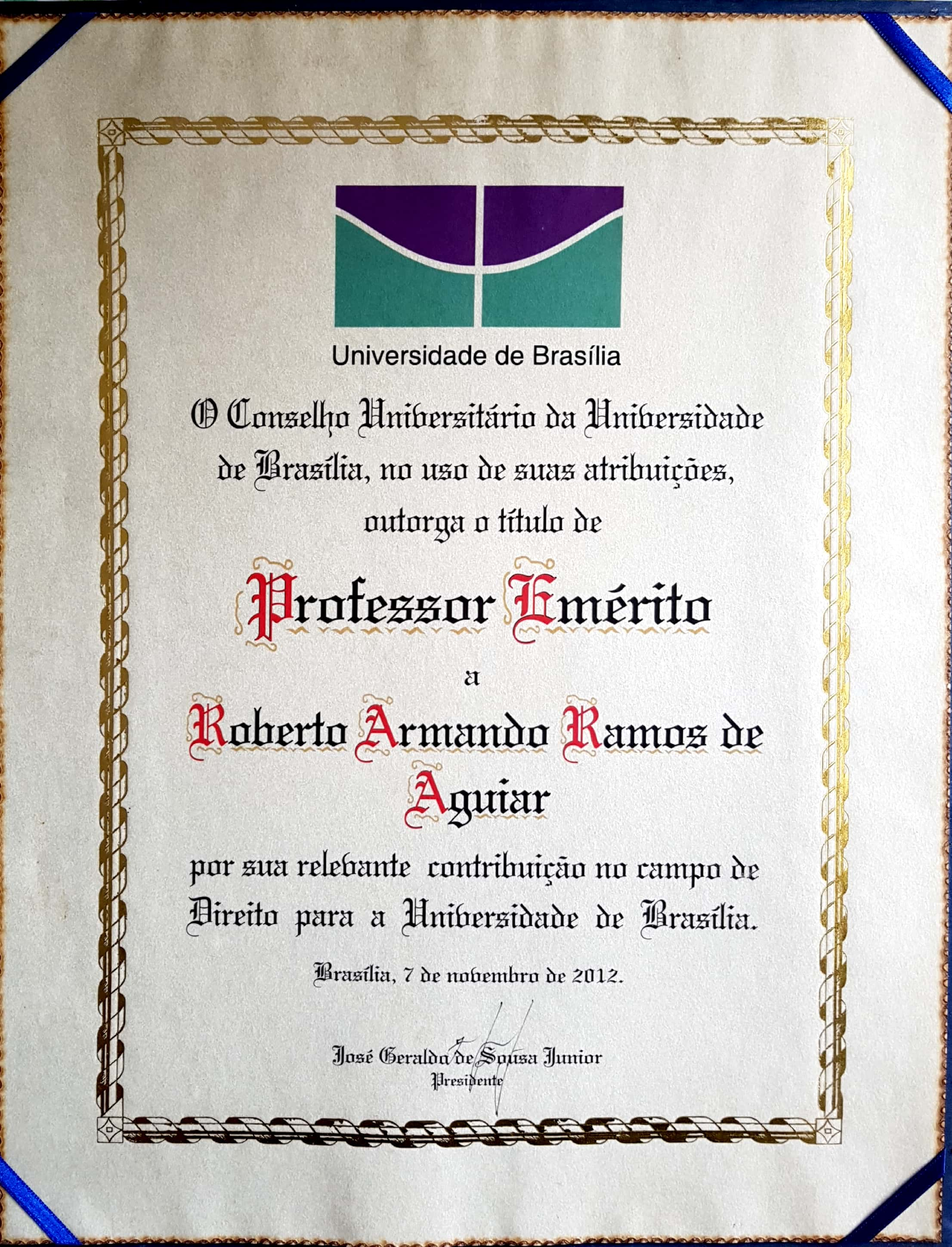 Título de professor emérito de Roberto Aguiar.